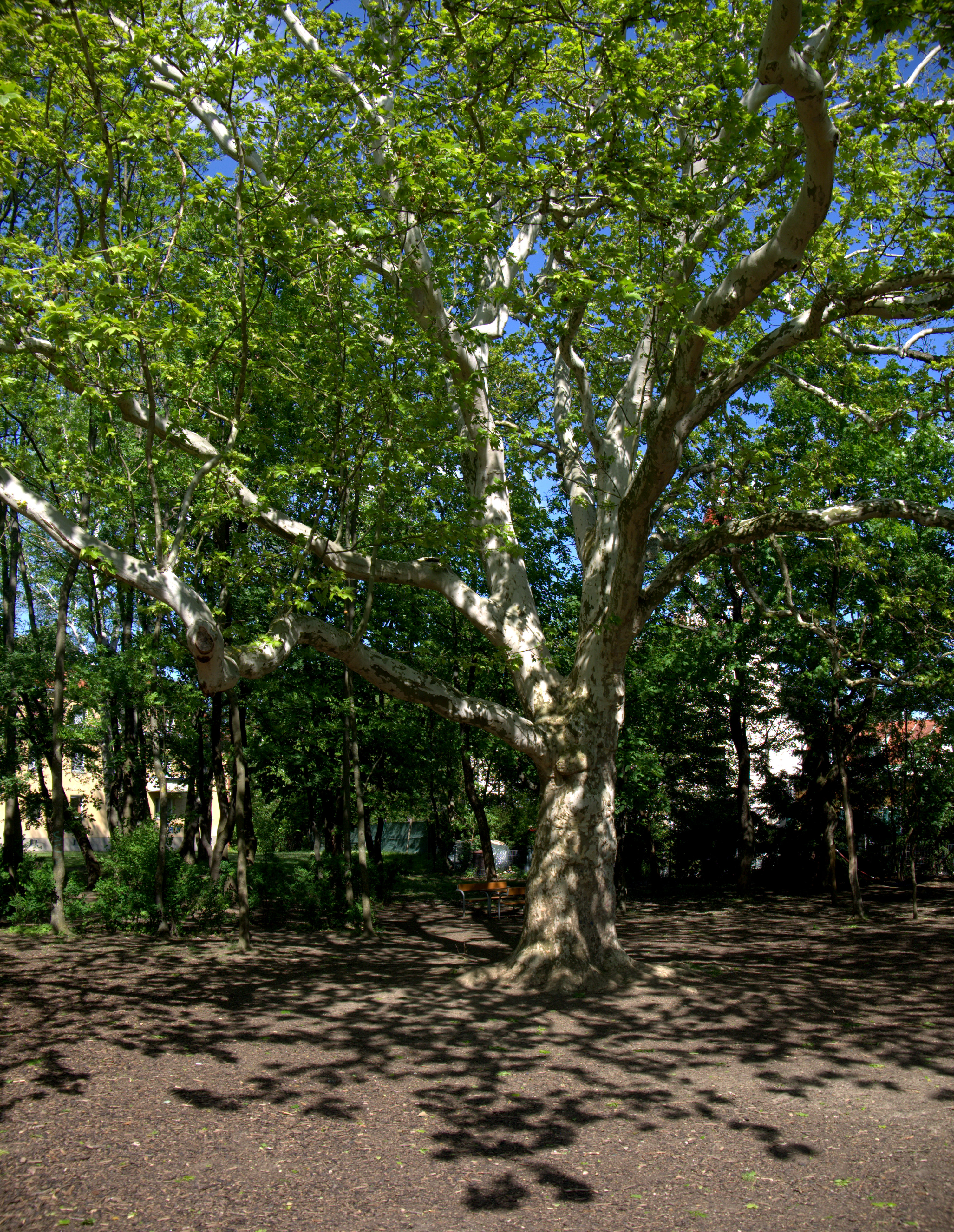 Baumgruppe This media shows the natural monument in Vienna with the ID 551.